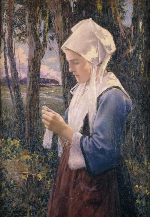 Travail paisible